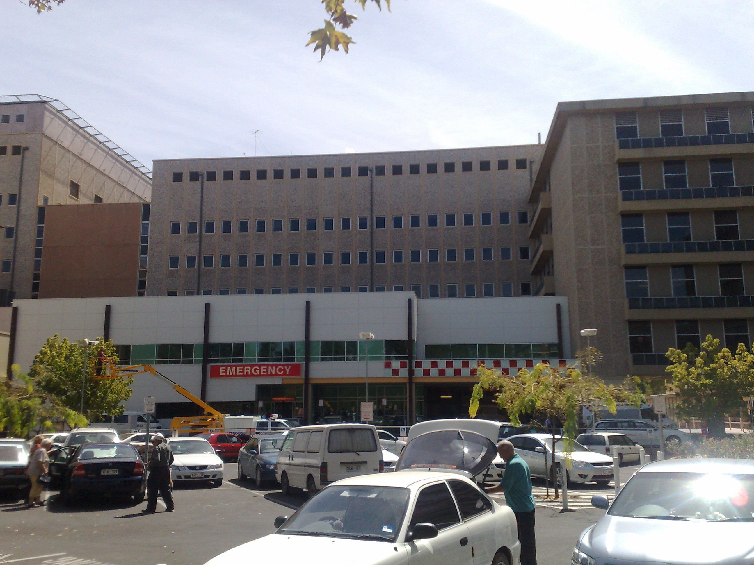 Royal Adelaide Hospital, Adelaide